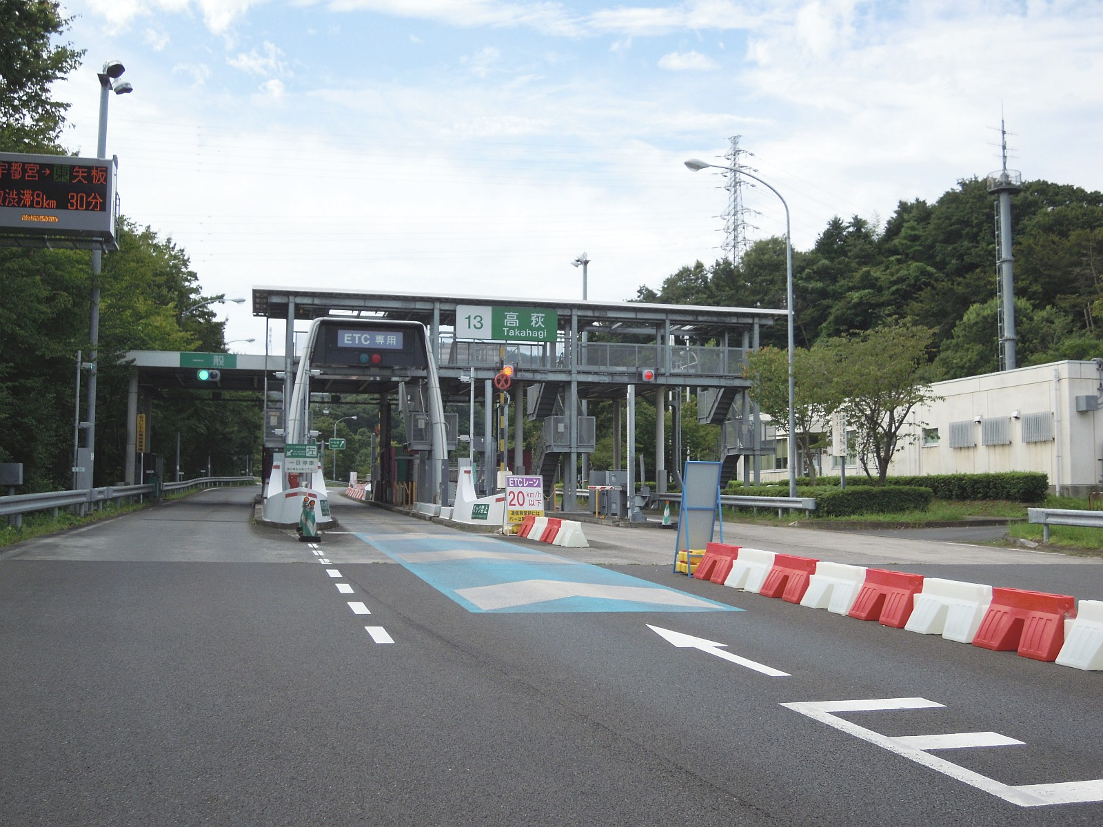 茨城県高萩市にある常磐自動車道の高萩インターチェンジ料金所を一般道側から。